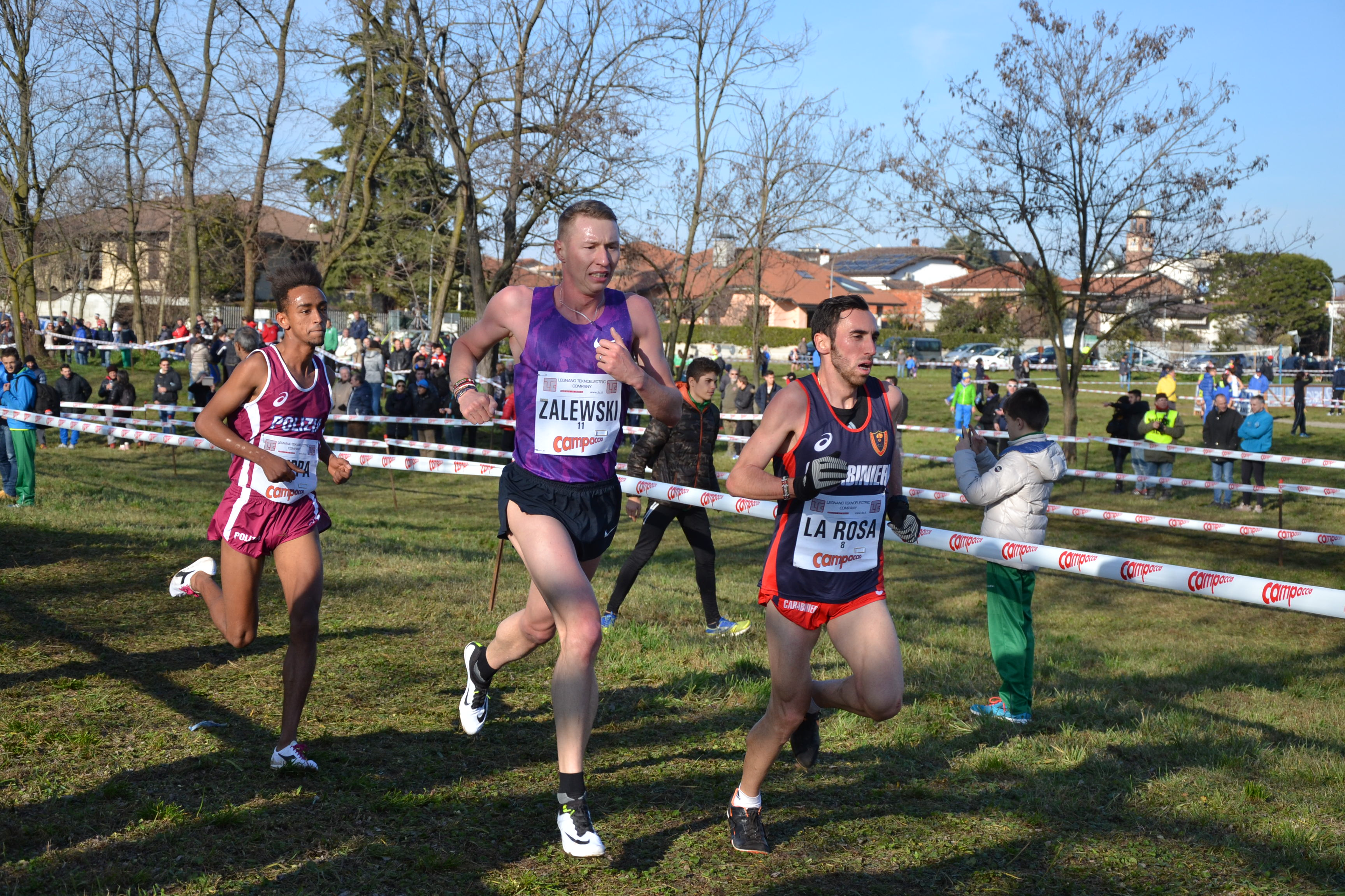 59º Cross del Campaccio. San Giorgio su Legnano, 6 gennaio 2016 Attribuzione: Lucia Moretti / A.S.D. Polisportiva Olonia / CC-BY-SA